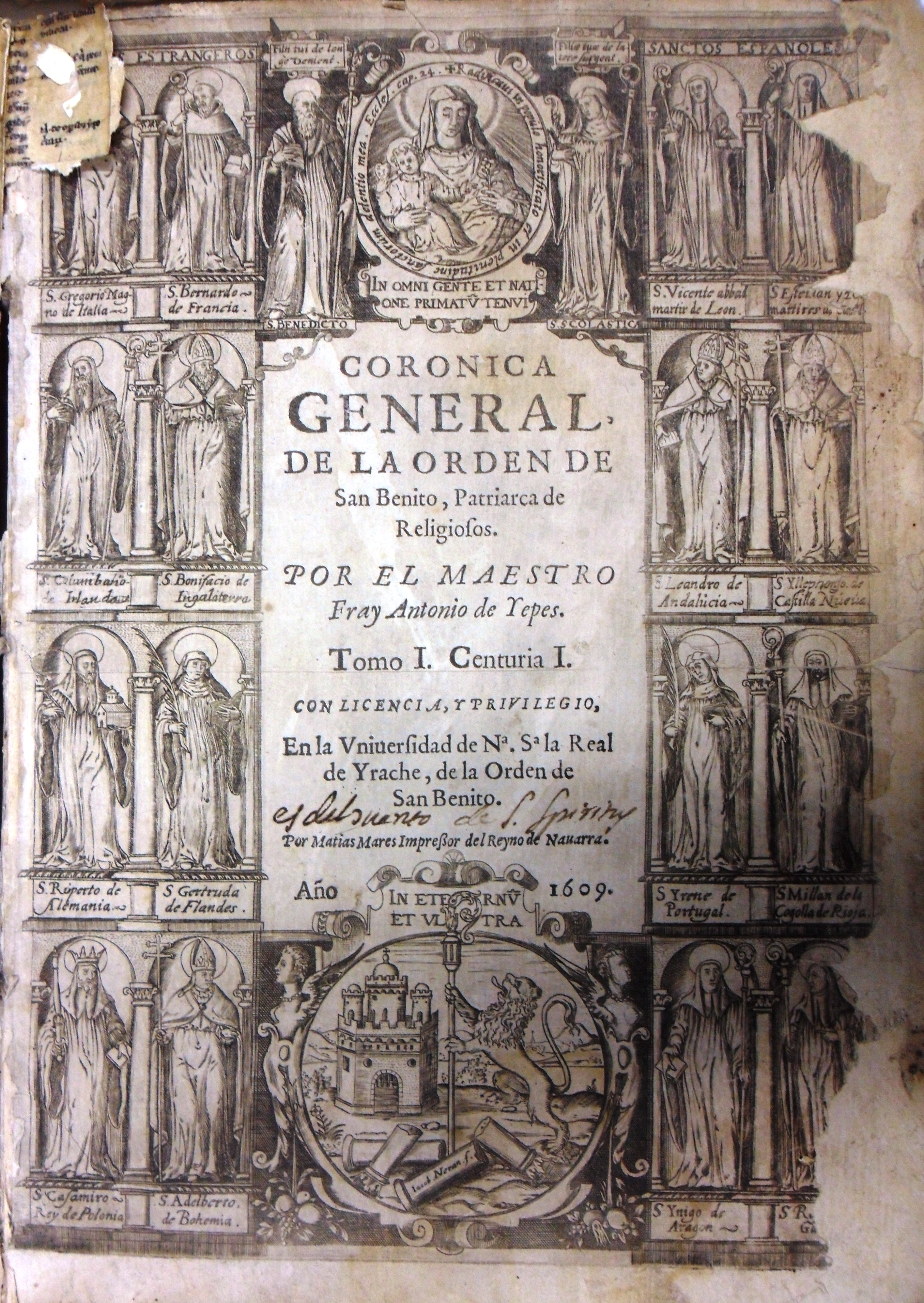 Portada de la Crónica General de la Orden de San Benito. Tomo I, de Antonio Yepes, Matías Mares impresor en el Monasterio de Irache (Navarra) en 1609